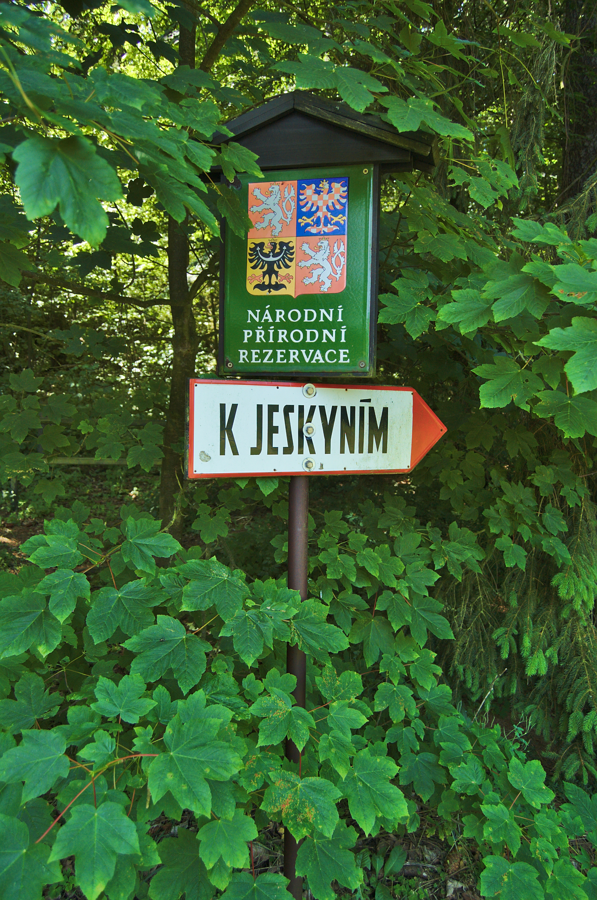 Národní přírodní rezervace Špraněk, okres Olomouc